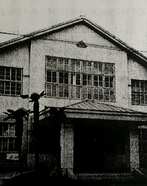 愛知県丹羽郡の大口町公民館。1967年。